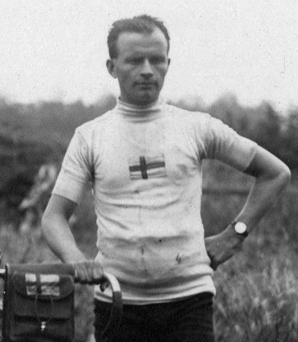 Sigfrid Lundberg